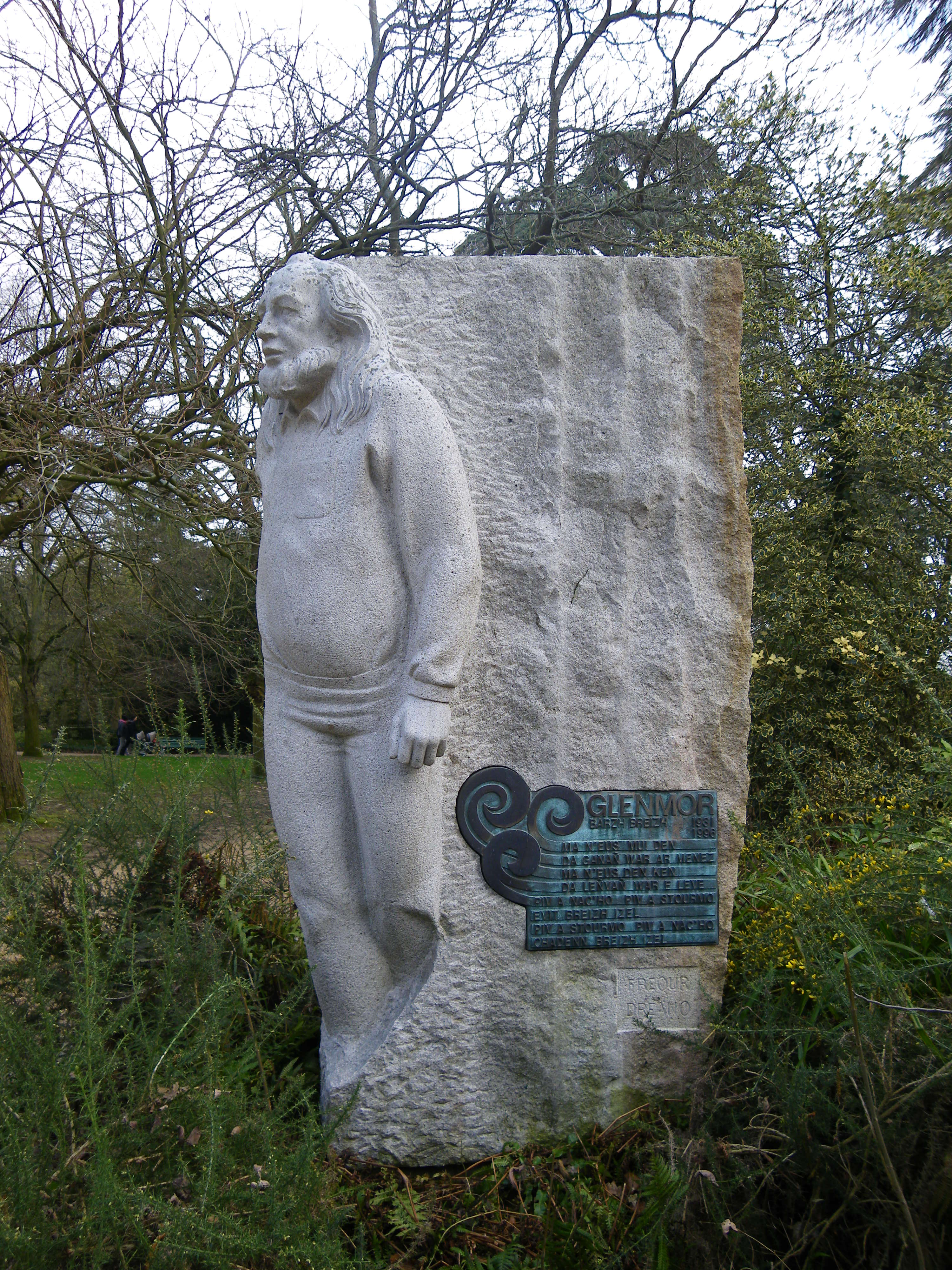 la statue de glenmor au jardin du thabor